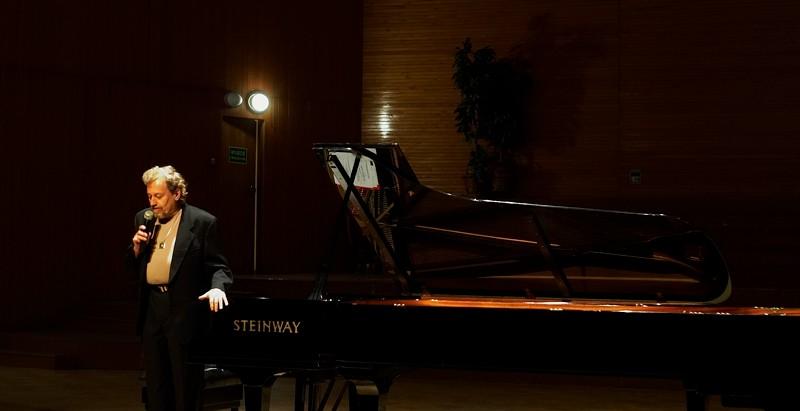 Adam Makowicz - Koncert w Filharmonii Rzeszowskiej (październik 2006)